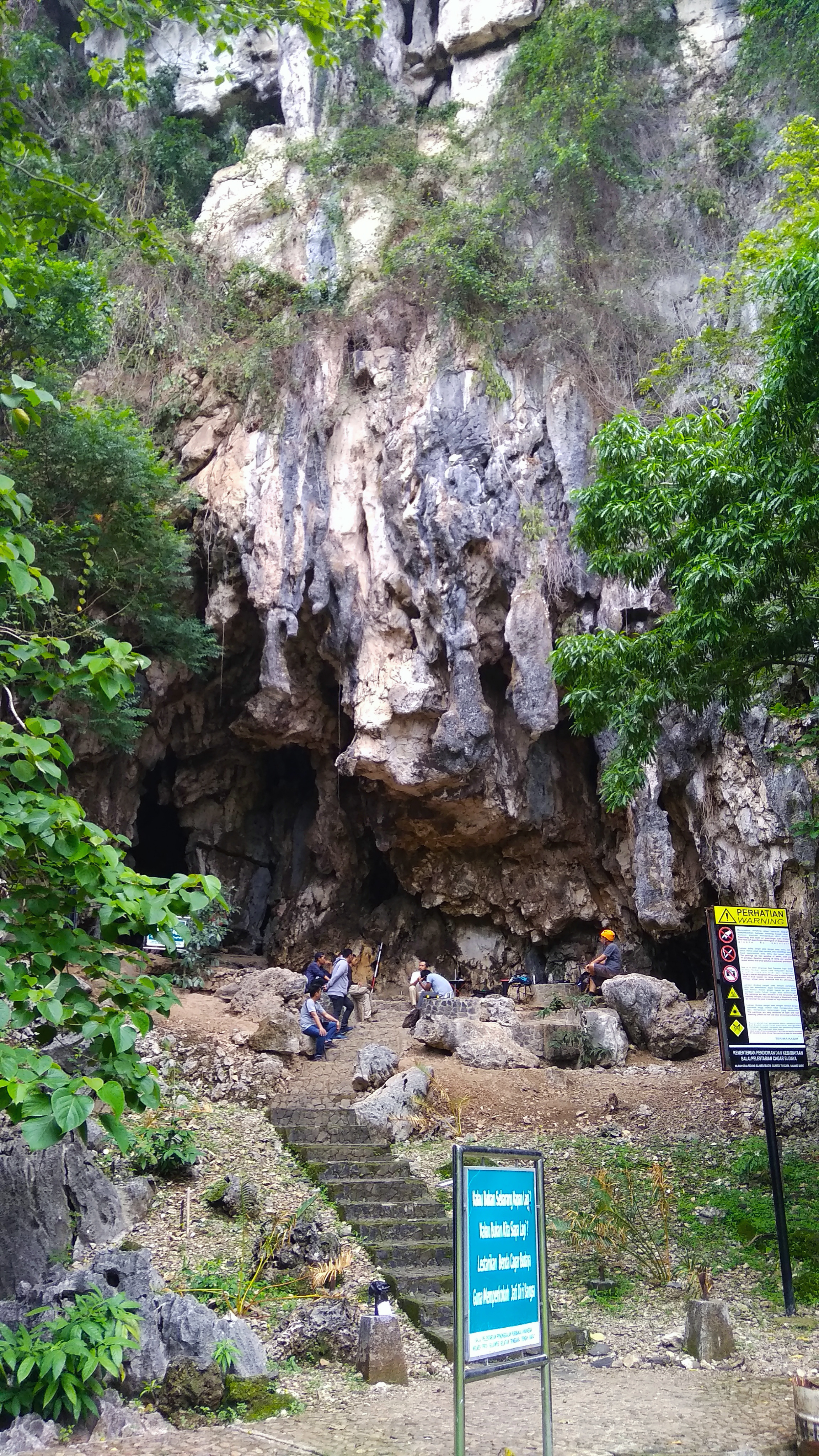 Gua Pettae di Maros, Sulawesi Selatan. Di Gua ini terdapat lukisan prasejarah berusia puluhan ribu tahun.